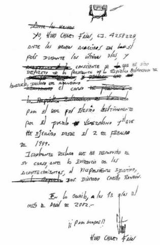 Supuesta carta de renuncia del presidente Hugo Chávez.